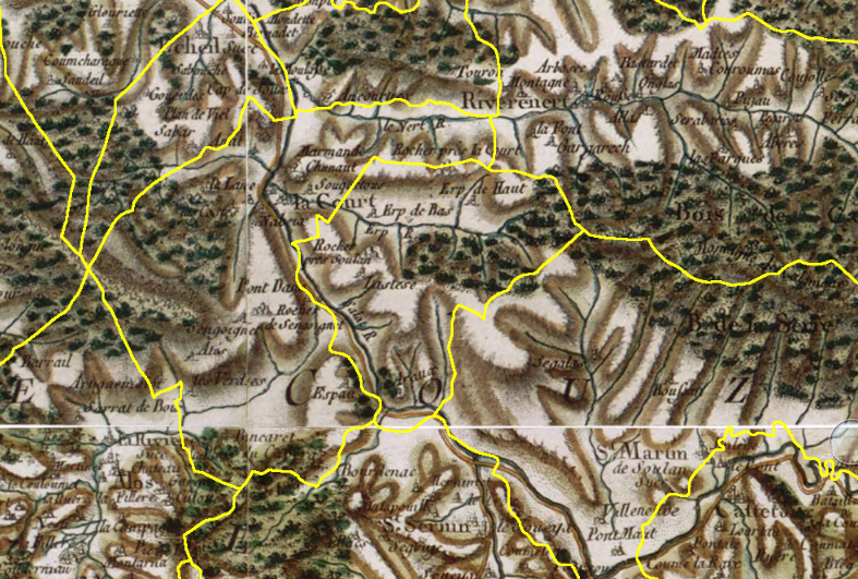 Extrait de la carte de Cassini ( 1780-1810) centrée sur Erp, en Ariège, sur laquelle ont été tracées les limites communales d'aujourd'hui